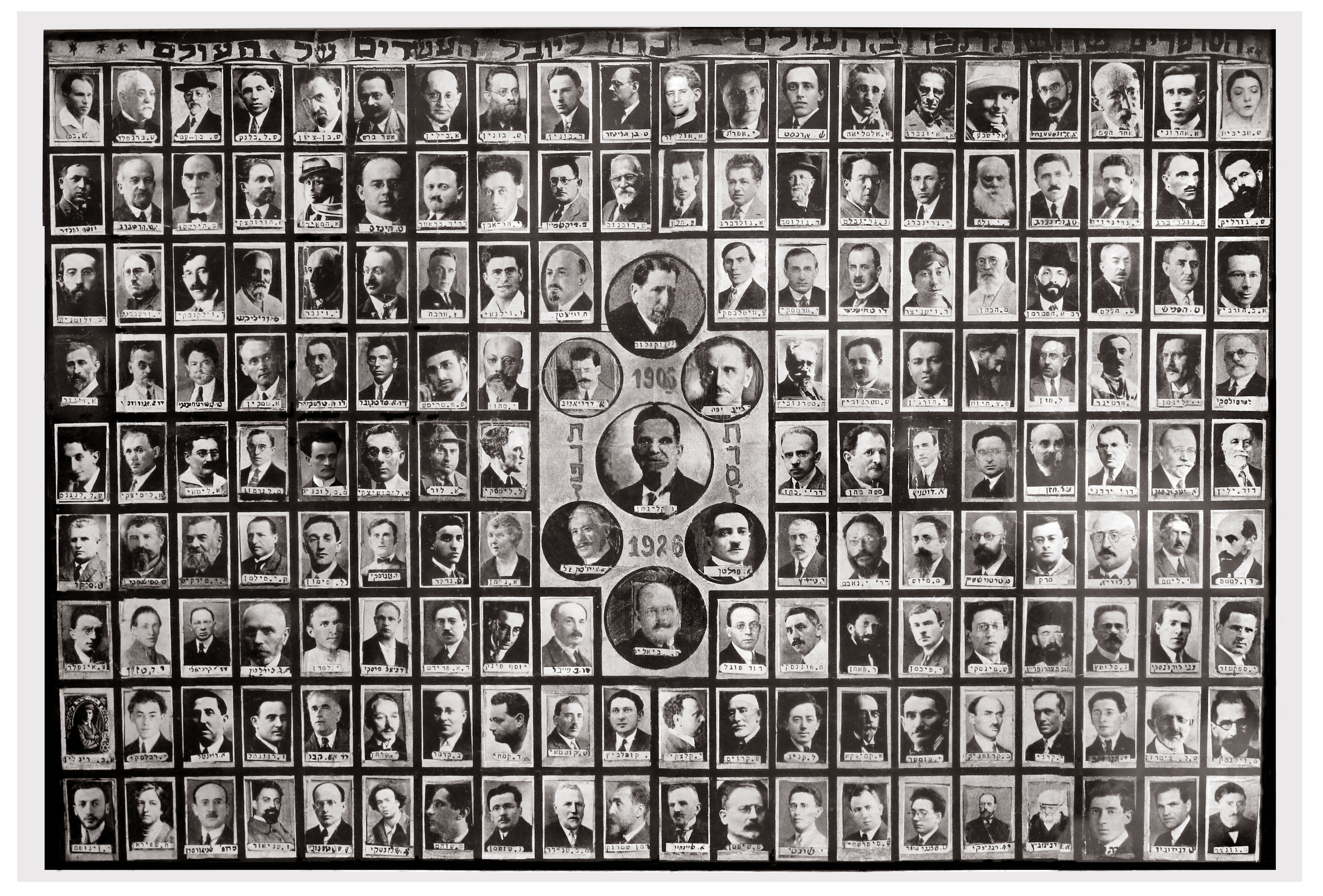 הסופרים שהשתתפו בשבועון העולם צילום ליובל העשרים.